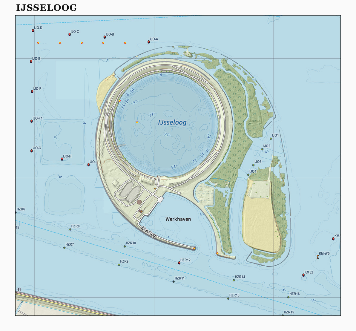 Topografische kaart van het IJsseloog. Resolutie: 400 pixels/km. Samengesteld door Jan-Willem van Aalst op basis van de GML open geodata van de BRT/Top10NL (basisregistratie Topografie, Kadaster), vrijgegeven door Kadaster onder de Creative Commons BY licentie. Additionele gegevens uit BAG uit de Open Street Map en uit de Risicokaart. Zie ook de Legenda.